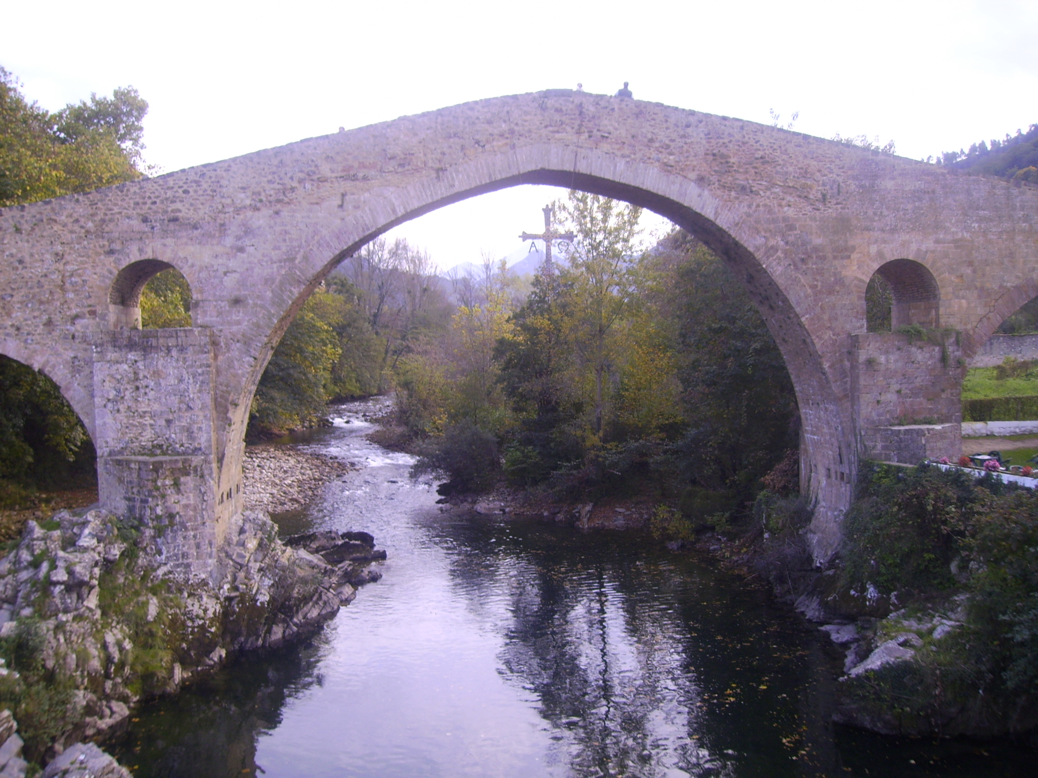 Fotografía del Puente Romano de Cangas de Onís, Asturias, España